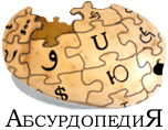 Absurdopedia's logo.